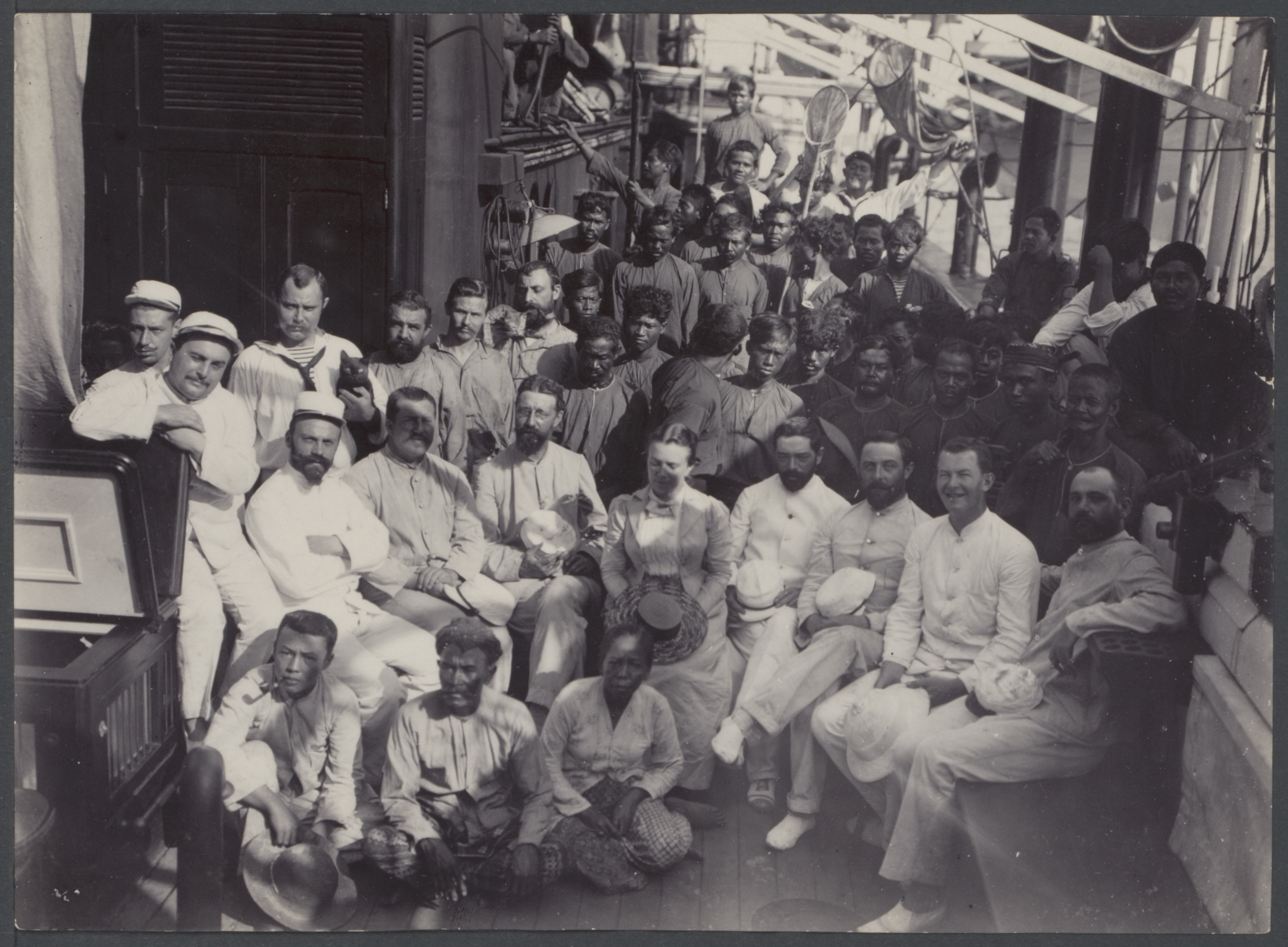 Academische Collecties: 1899-1900, Siboga-expeditie naar Nederlands Oost-Indië, onder leiding van Max Wilhelm Carl Weber Groepsfoto, gemaakt op het dek van de Siboga. In het midden Anna Weber-van Bosse, aan haar rechterkant Max Weber en vlak voor haar Baboe, de persoonlijke bediende van Anna. Linksonder met een pijp de tekenaar van de expeditie, J.W. Huysmans.